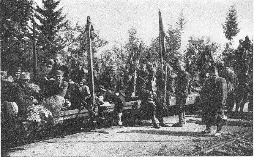 Srpskohrvatski / српскохрватски: Partizani vozom kreću iz Mliništa na front, novembra 1942.